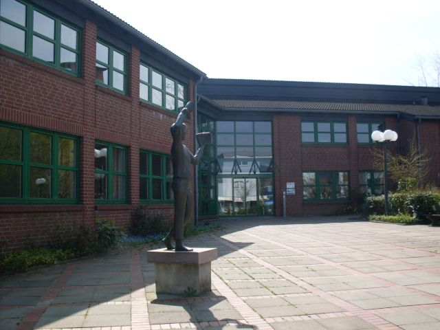 Das Bürgerhaus der ehemaligen Gemeinde Klausdorf.